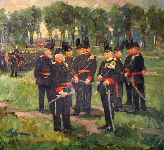 Groepsportret van de Dienstdoende Stadsschutterij Maastricht, kort voor de opheffing in 1907. mogelijk geportretteerd in De Kommen, het voornaamste oefenterrein. De opzet van het schilderij is van Henri Goovaerts. De uitvoering vond tussen 1912 en 1916 plaats door zijn leerlingen Henri Jonas, Guillaume Eberhard en Rob Graafland. Olieverf op doek, 150 x 200 cm. Het schilderij is eigendom van de Gemeente Maastricht, die het in 1951 in bruikleen gaf aan het Bonnefantenmuseum. Het museum gaf het in 2007 in bruikleen aan de heropgerichte Maestrichtsche Dienstdoende Stadsschutterij 1815.